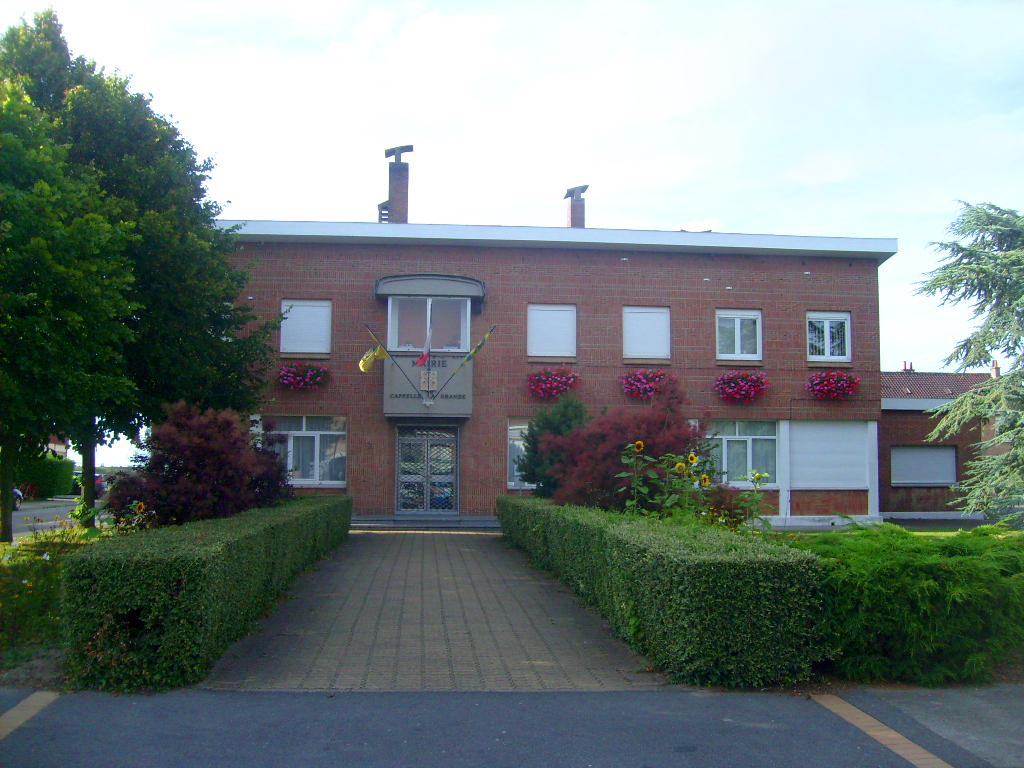 Mairie de Cappelle-La-Grande